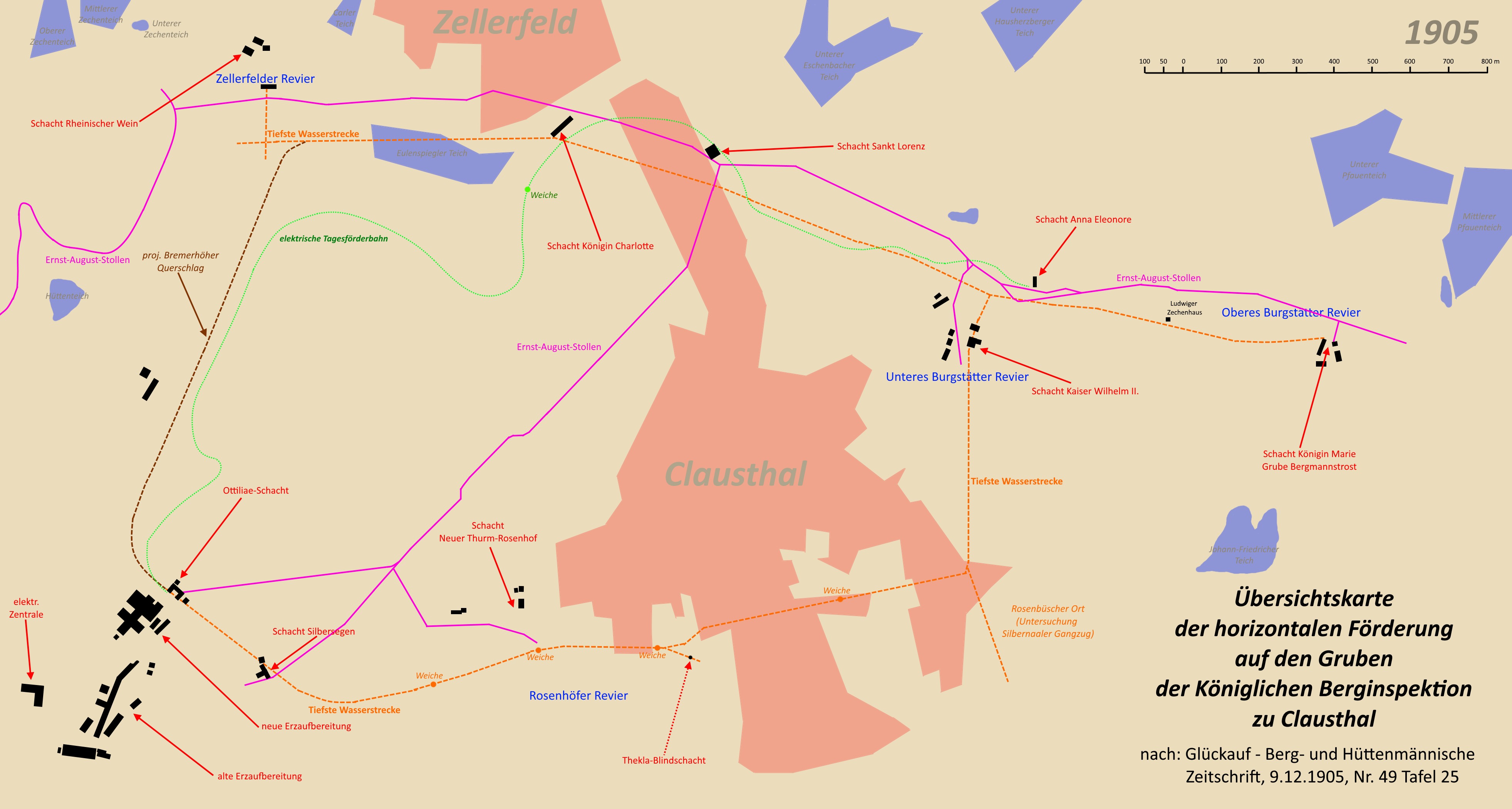 Übersichtskarte horizontale Förderung Berginspektion Clausthal 1905, eigene Grafik erstellt nach "Glückauf - Berg- und Hüttenmännische Zeitschrift, 9.12.1905, Nr. 49, Tafel 25"